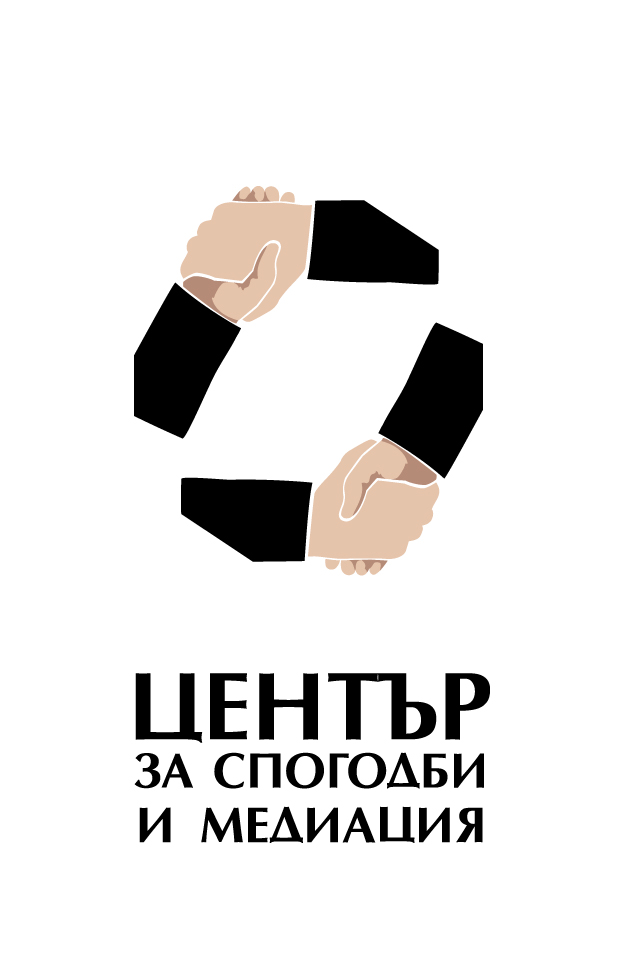 Лого на Център за спогодби и медиация към Софийския районен съд и Софийски градски съд